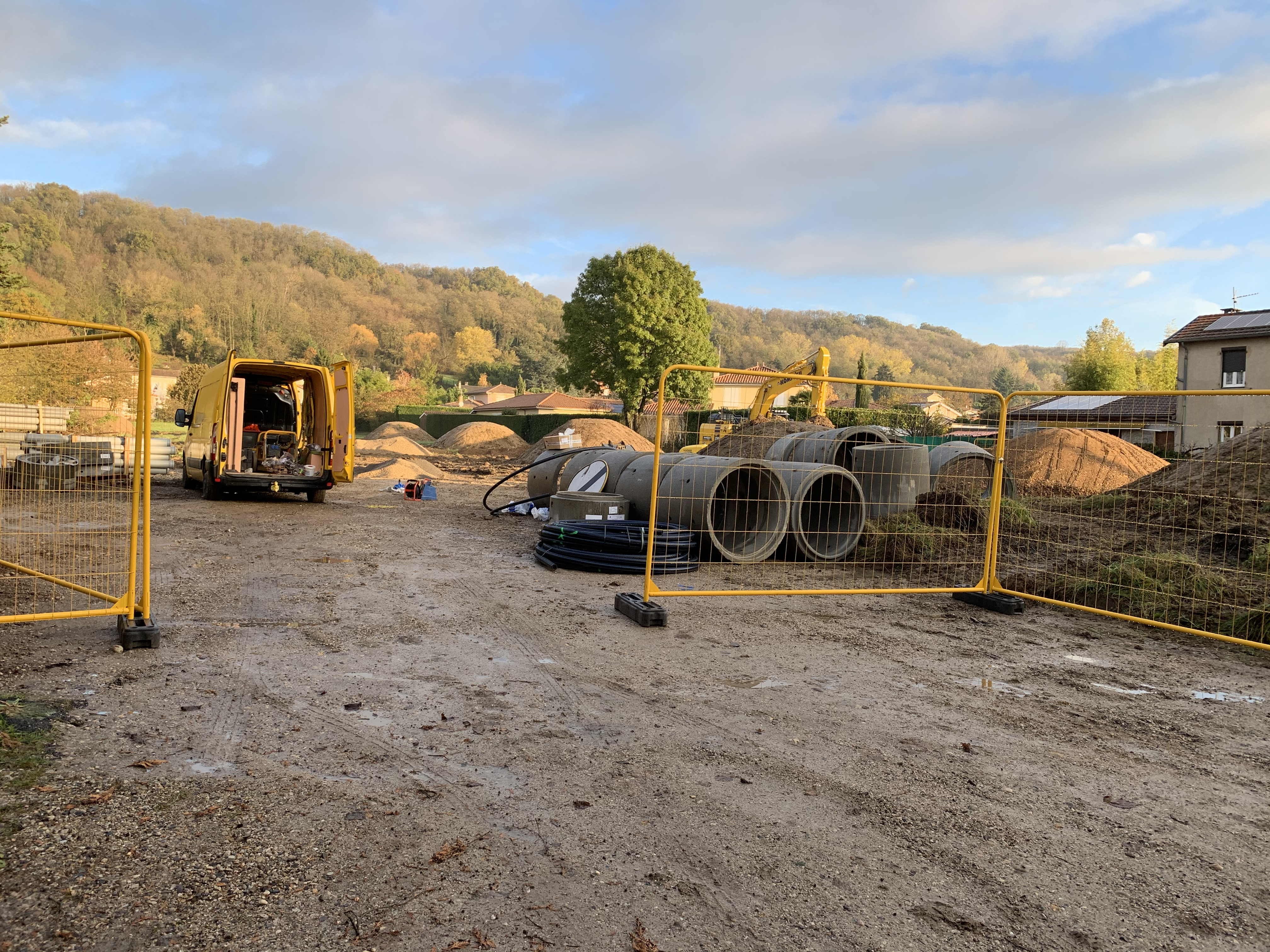 Le Mas des Andrés, travaux (novembre 2019).